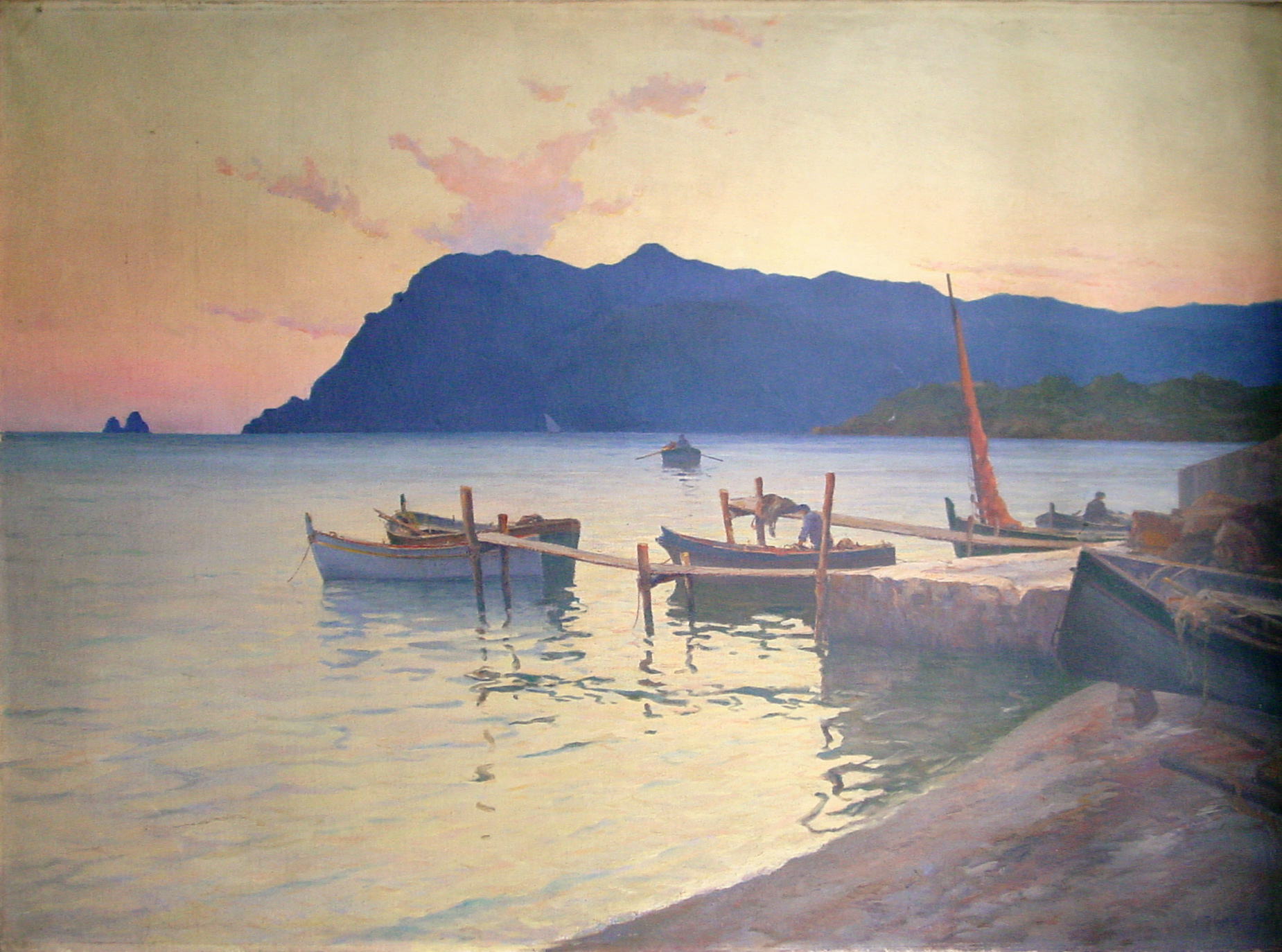 Marine peinte par Eugène Dauphin représentant des pêcheurs en barque ralliant un ponton au bord d’une plage avec, en arrière-plan, un coucher de soleil sur le Cap Sicié et le rocher des Deux-Frères près de Toulon. France